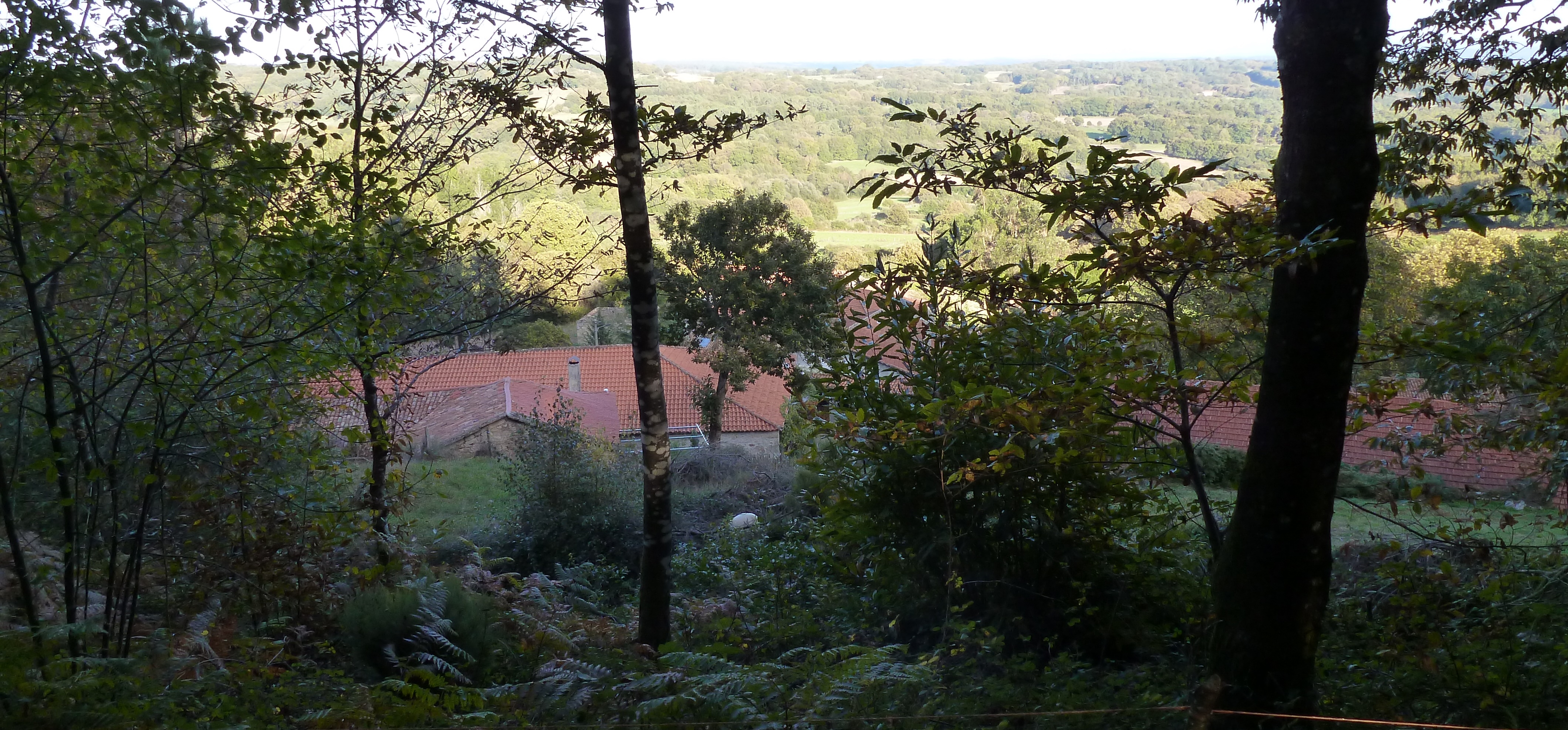 Loureiro de Riba, Buciños, Carballedo